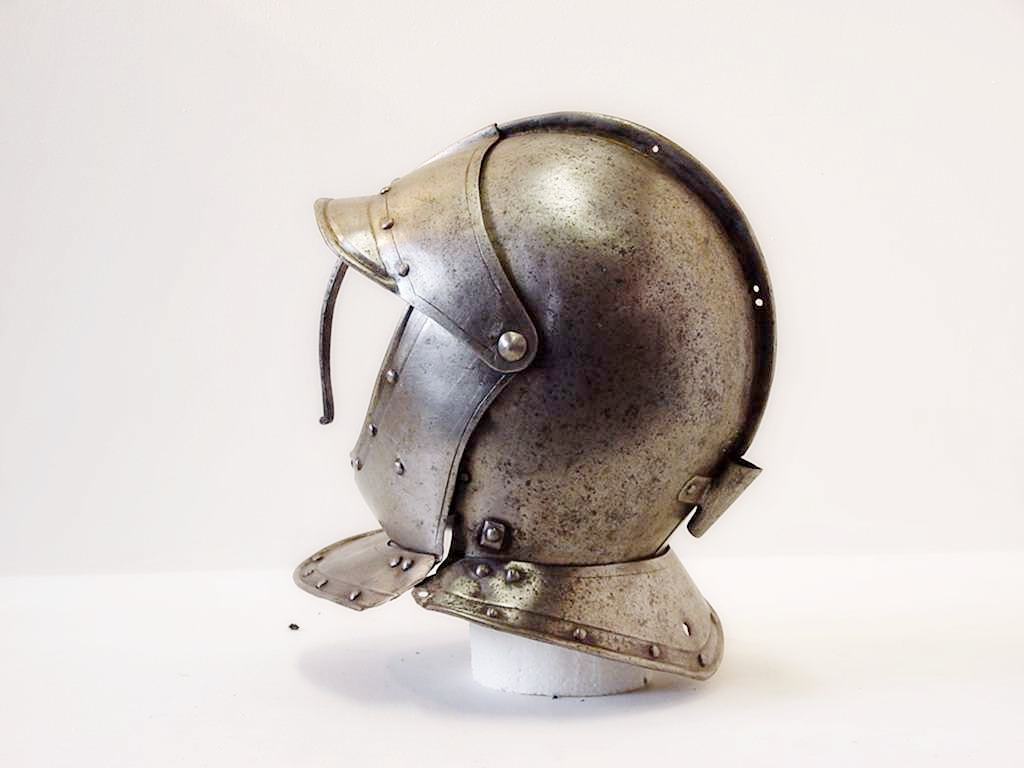 Helm van Spaanse edelman, bevelheber van in Vlissingen gelegerde Spaanse troepen. Werd bij de omwenteling in 1572 gevangen genomen en opgehangen in Vlissingen door de Watergeuzen onder leiding van Treslong